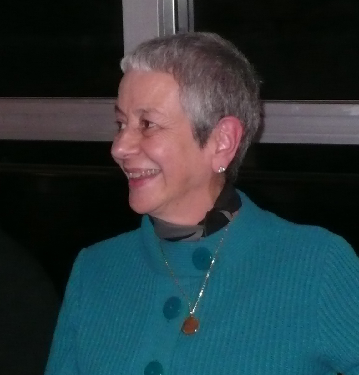 Marta Schinca en una entrevista en RTE.